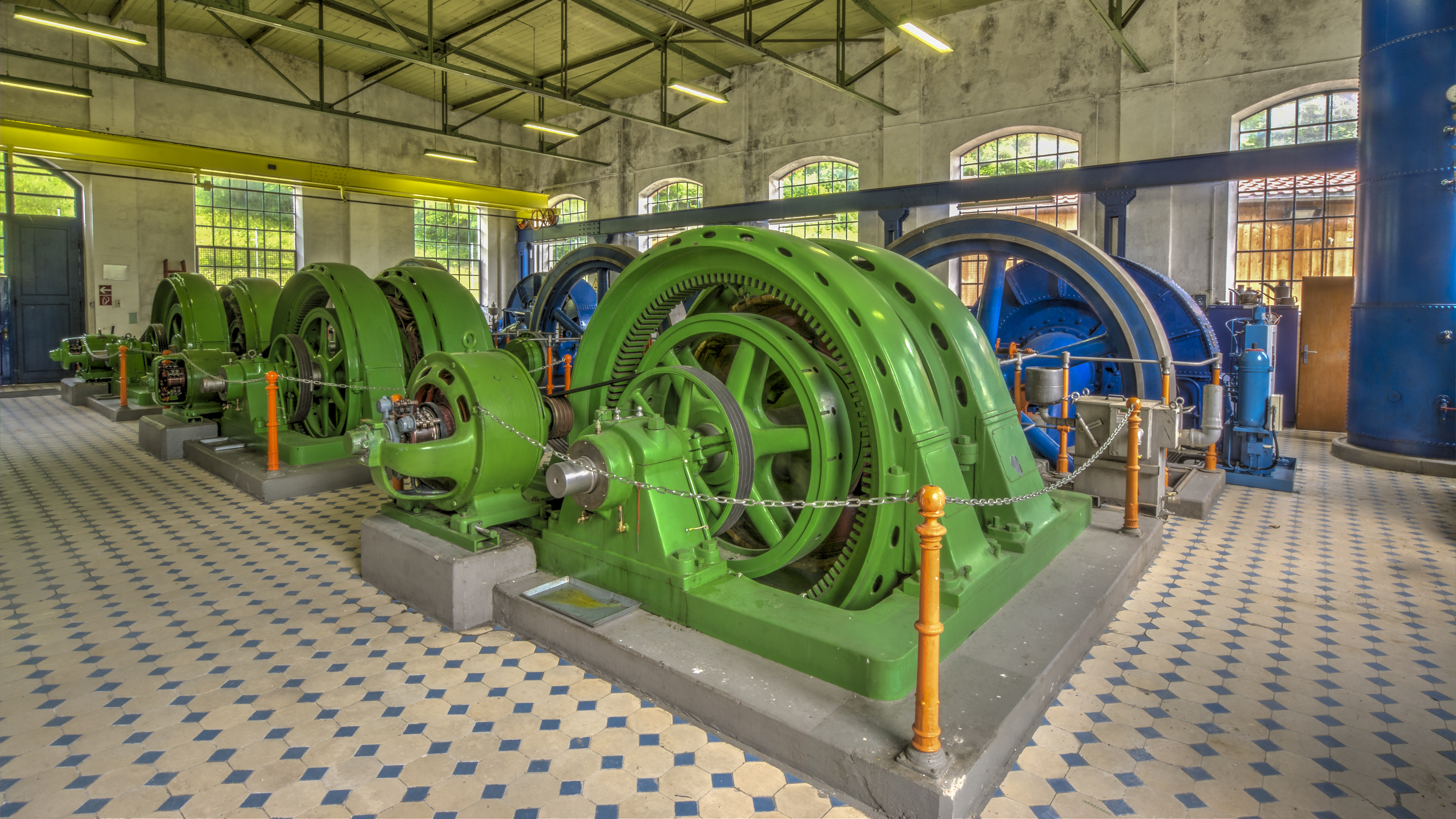 Maschinenhalle mit den drei Maschinensätzen